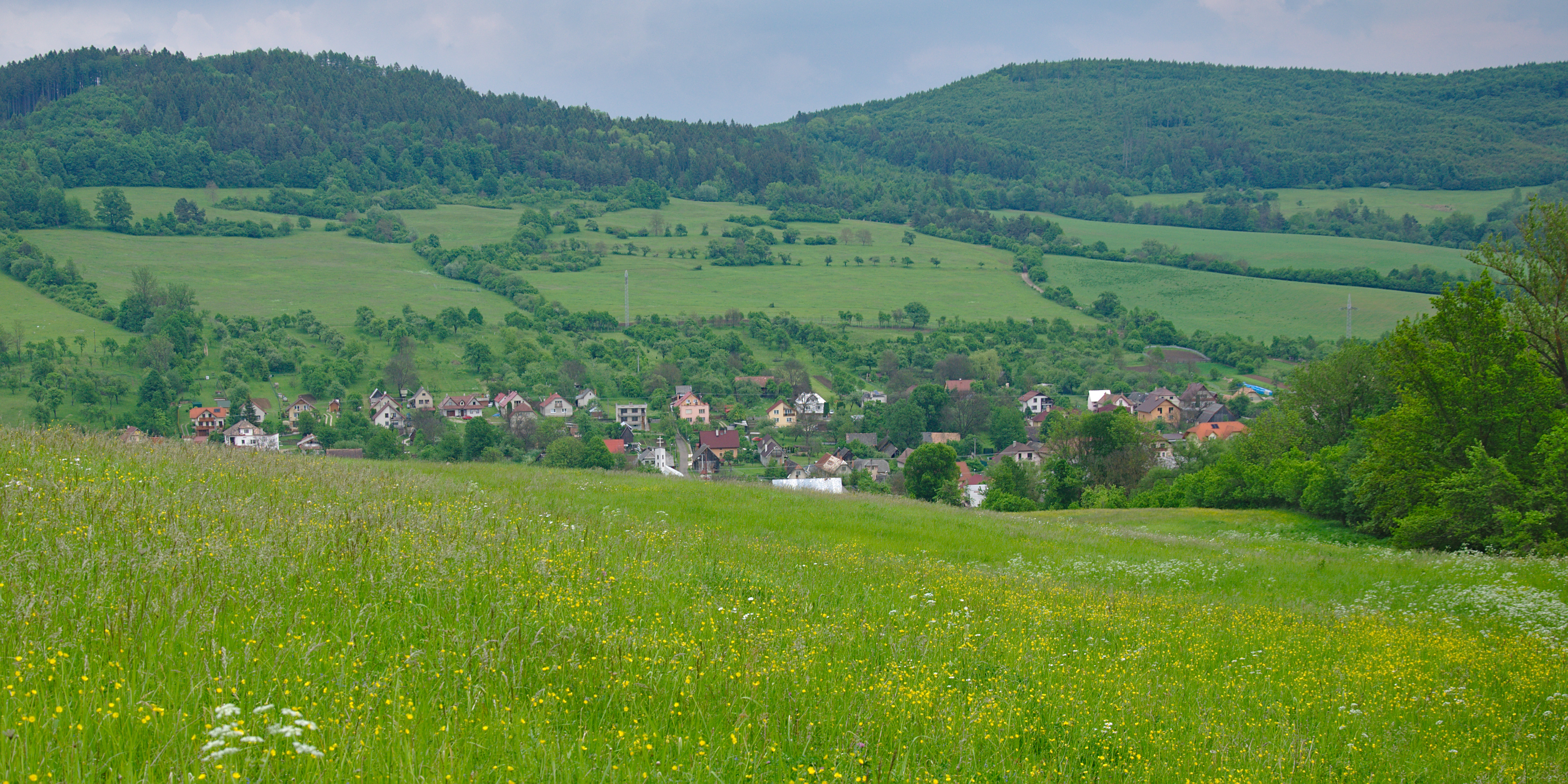 Pohled na obec od západu, Horná Breznica, okres Púchov